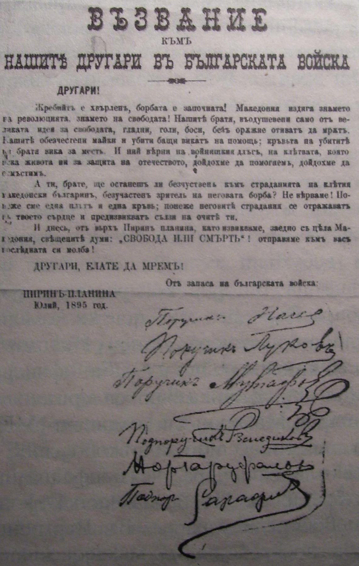 Апел на Върховния комитет при Четническата акция от 1895 година.